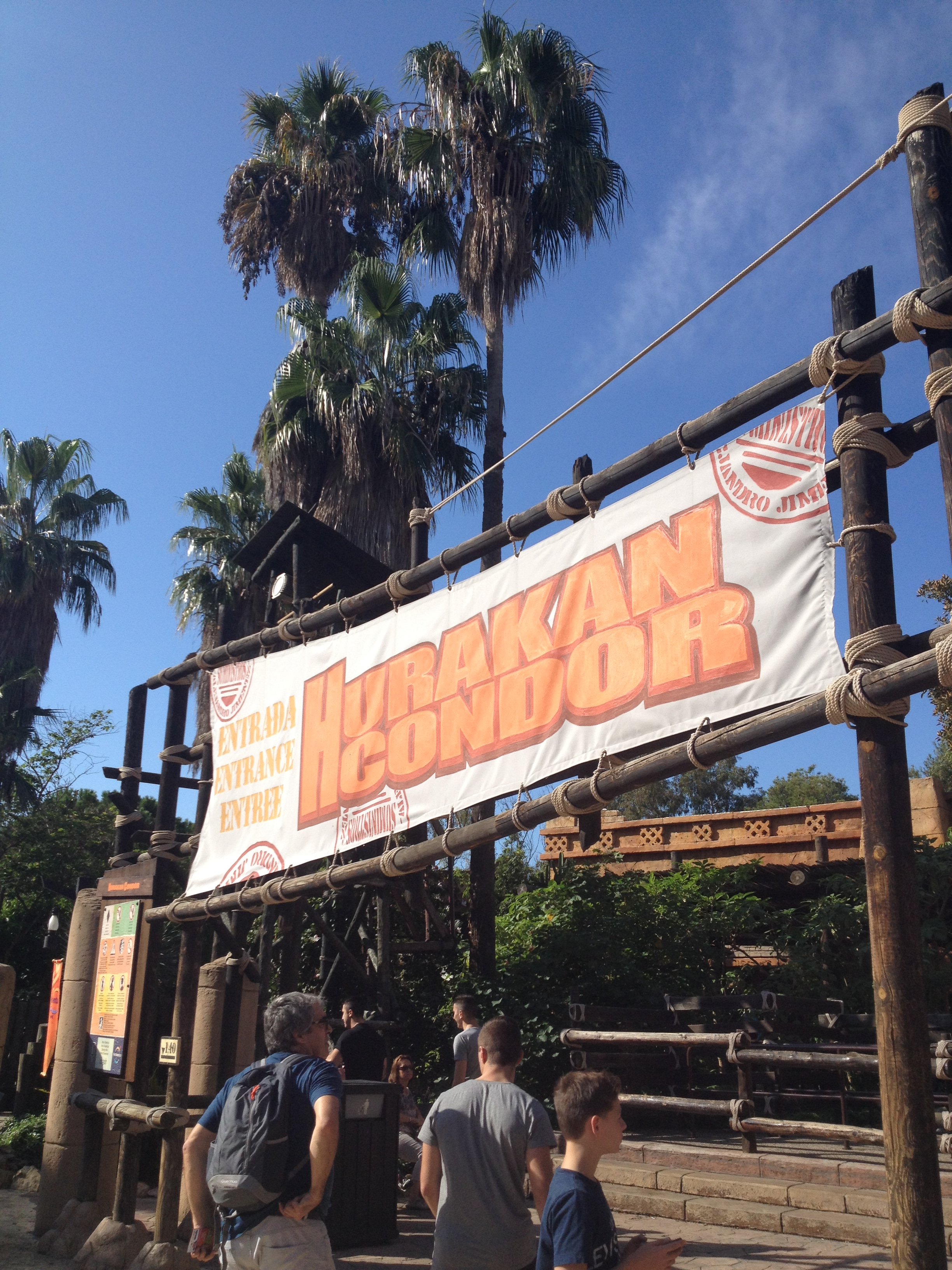 entrée